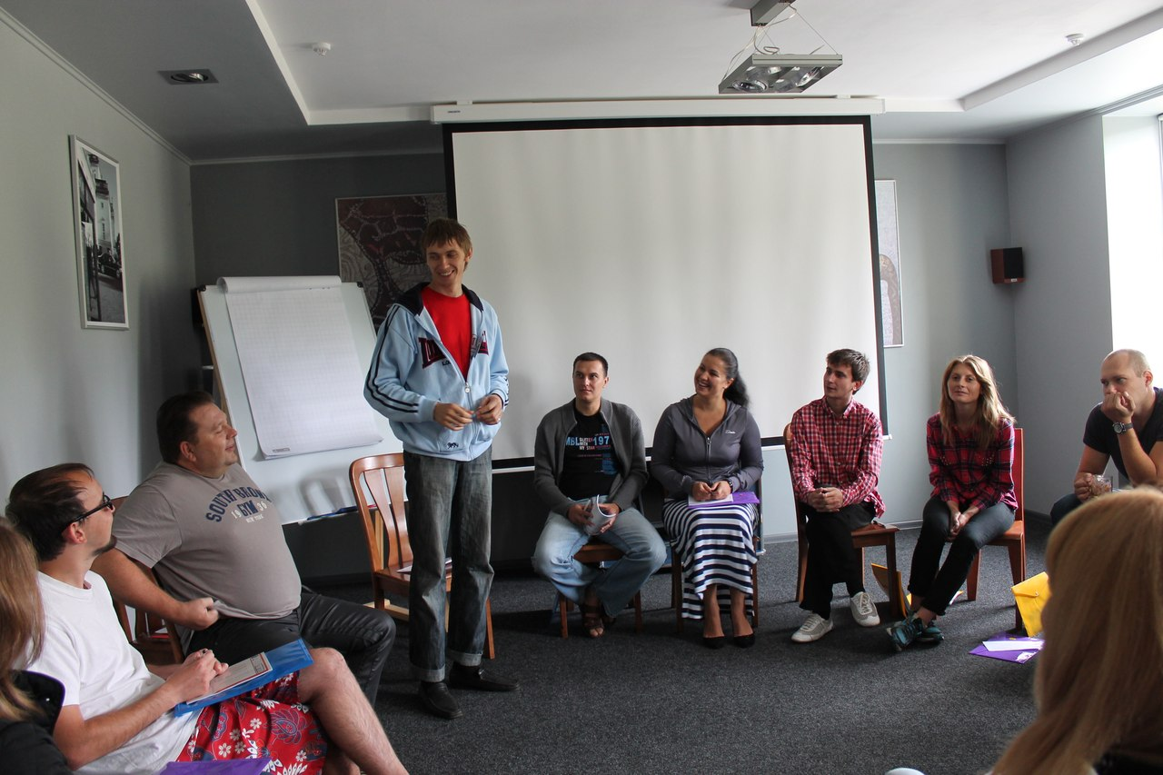 Заняття під час Тренінгу особистісного розвитку та творчості (ТОРТа). Село Вишків Івано-Франкавської області, Україна